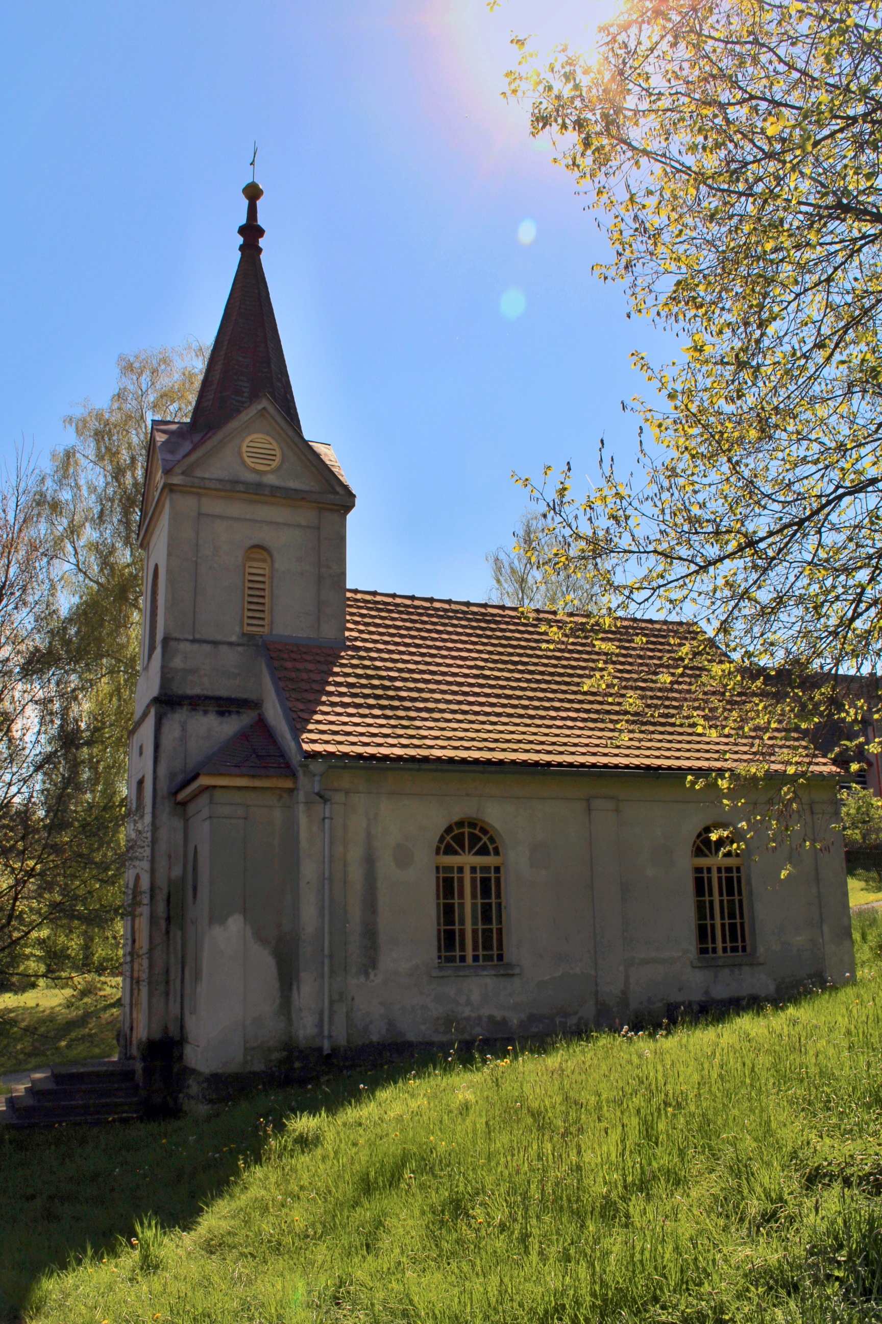 Svitava u Cvikova